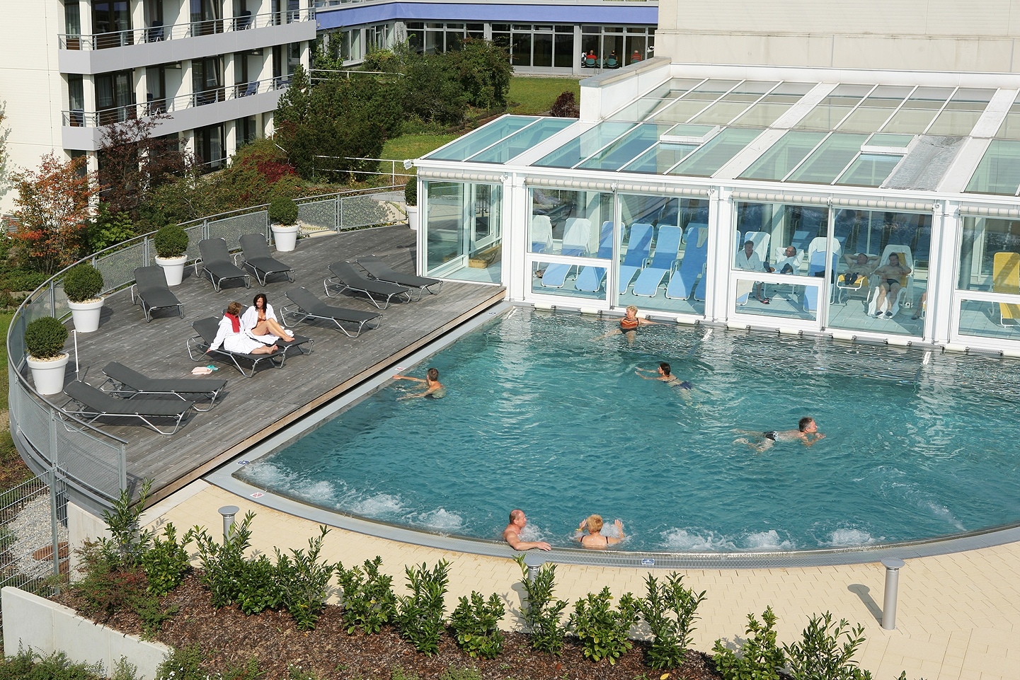 Thermalwasseraußenbecken Vitalium Bad Wurzach